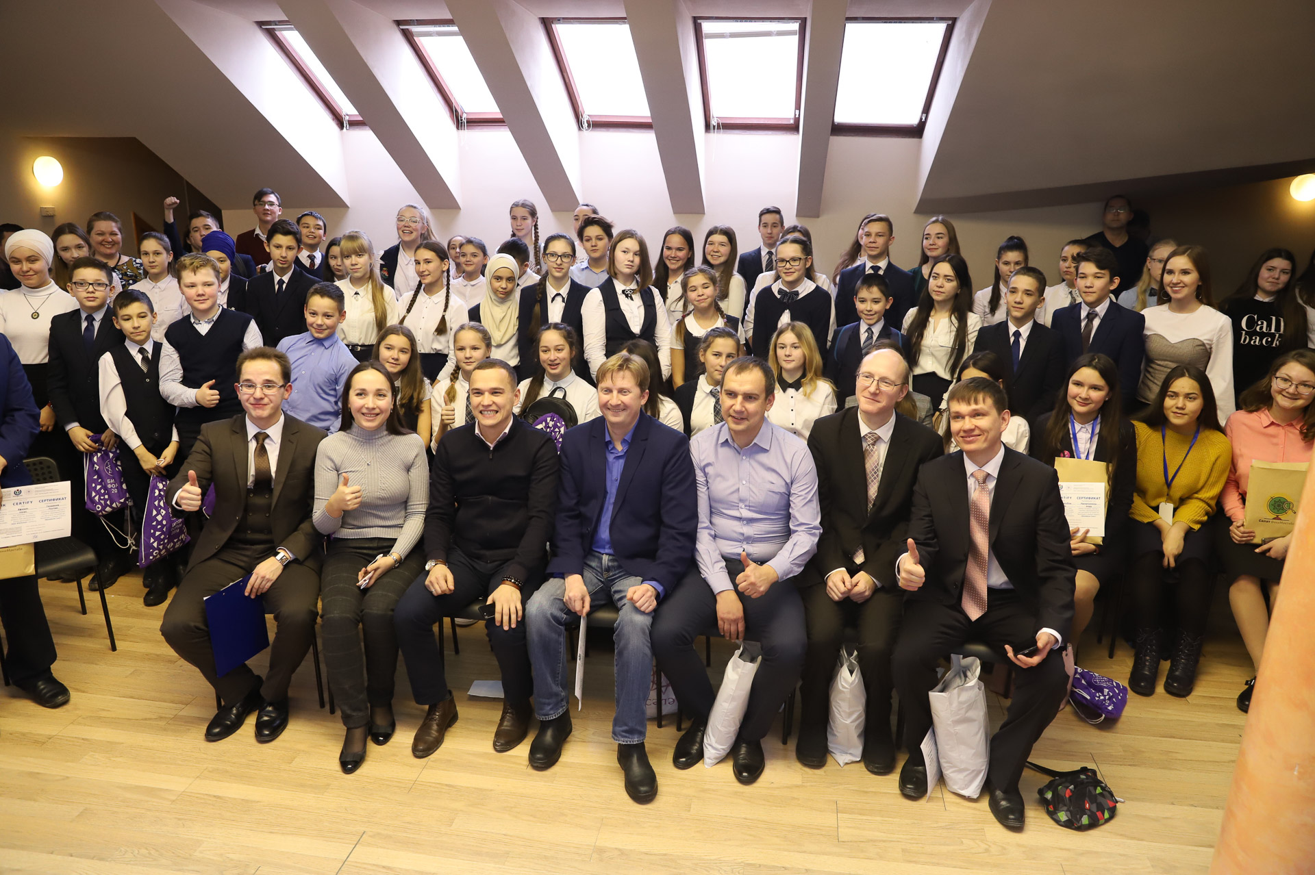 Участники конференции